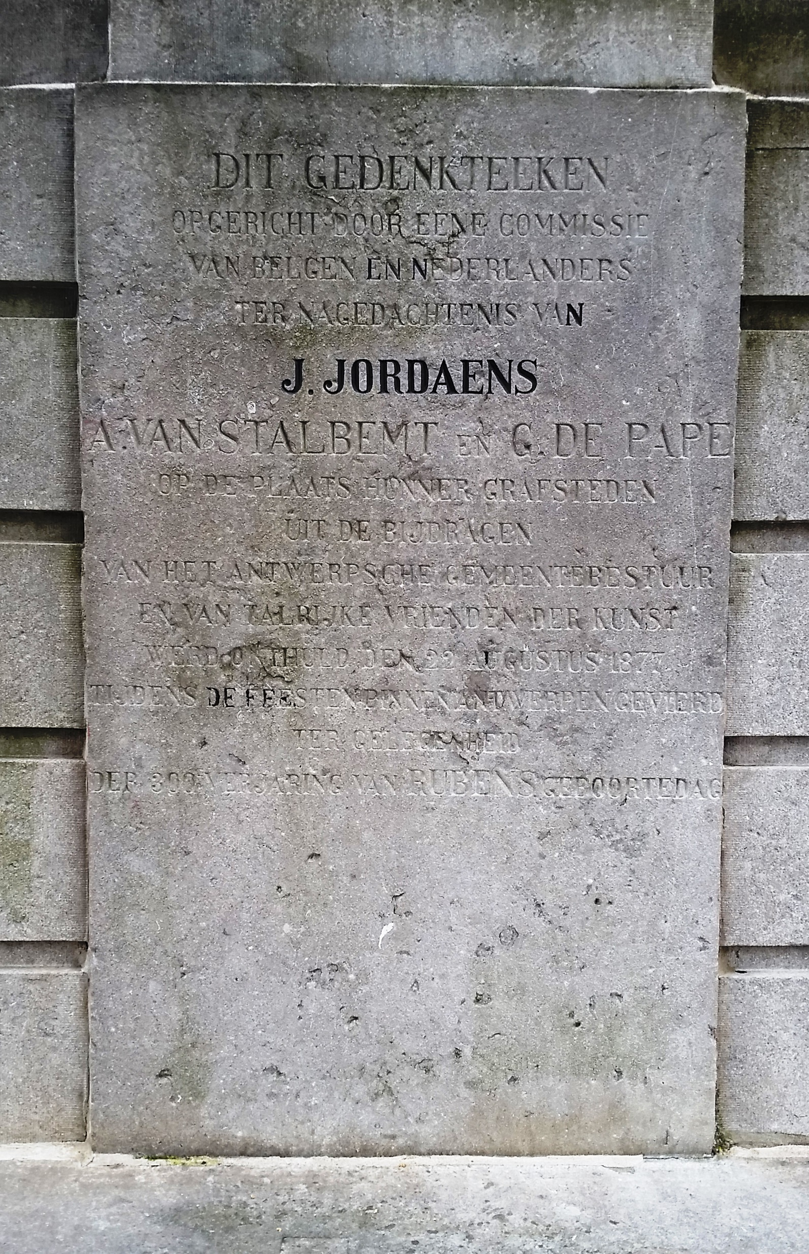 detail